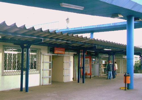 Estação Estudantes - CPTM